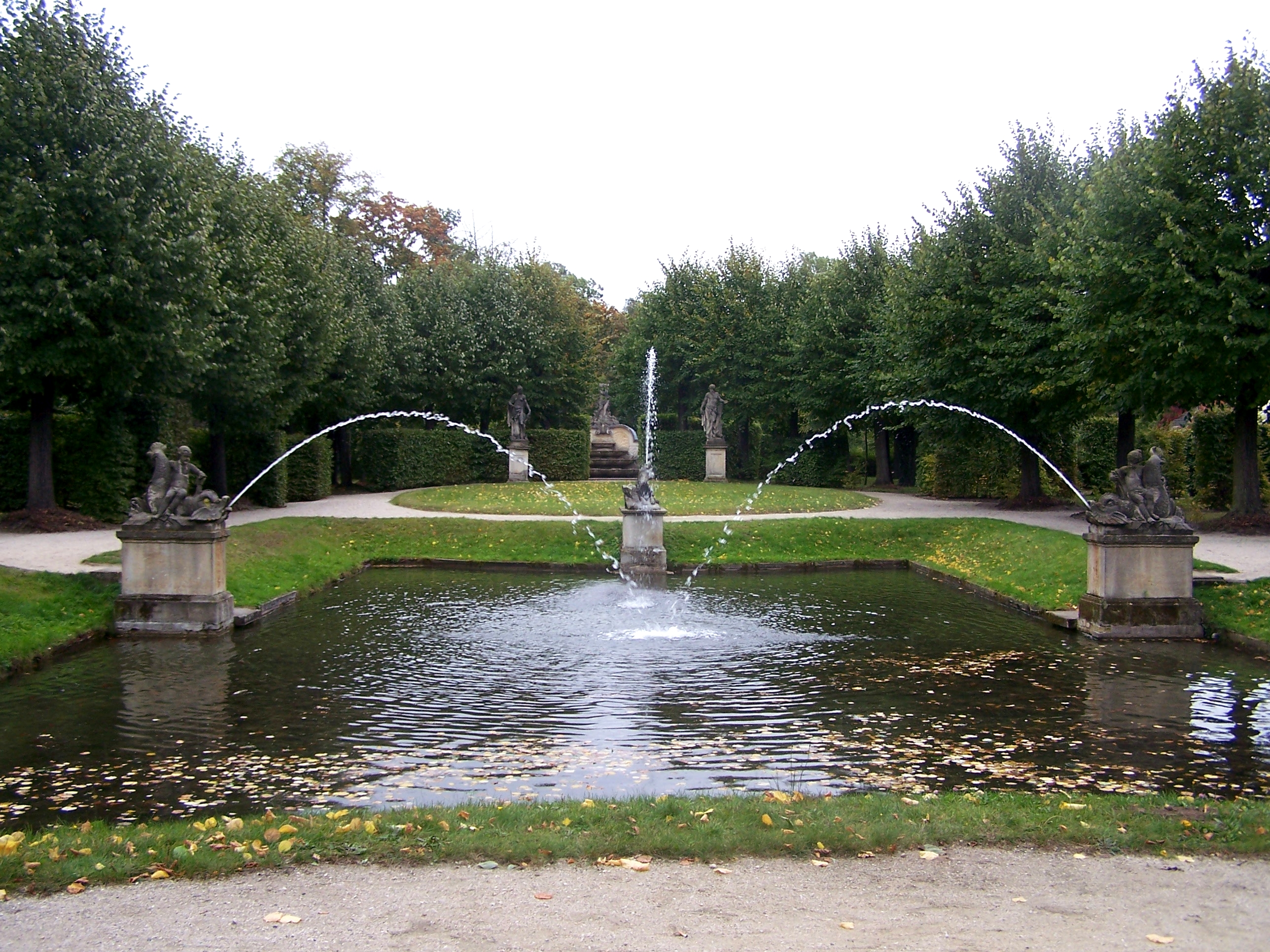 Teich im Französischen Garten des Schlossparks Altdöbern